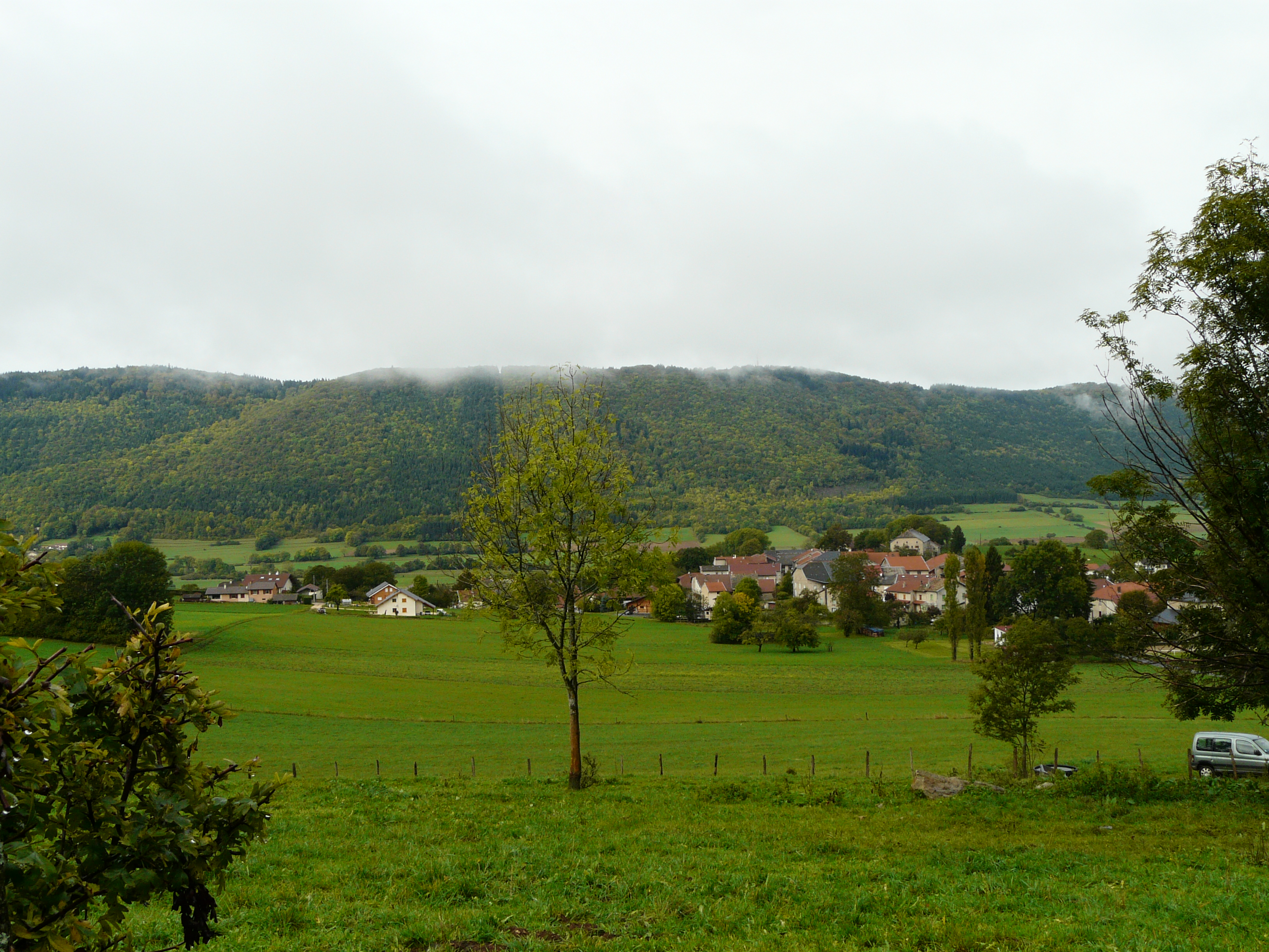 Lantenay (Ain)